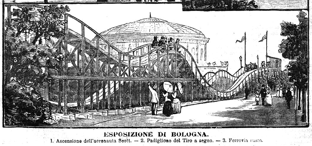 Ferrovia russa (oggi montagne russe)